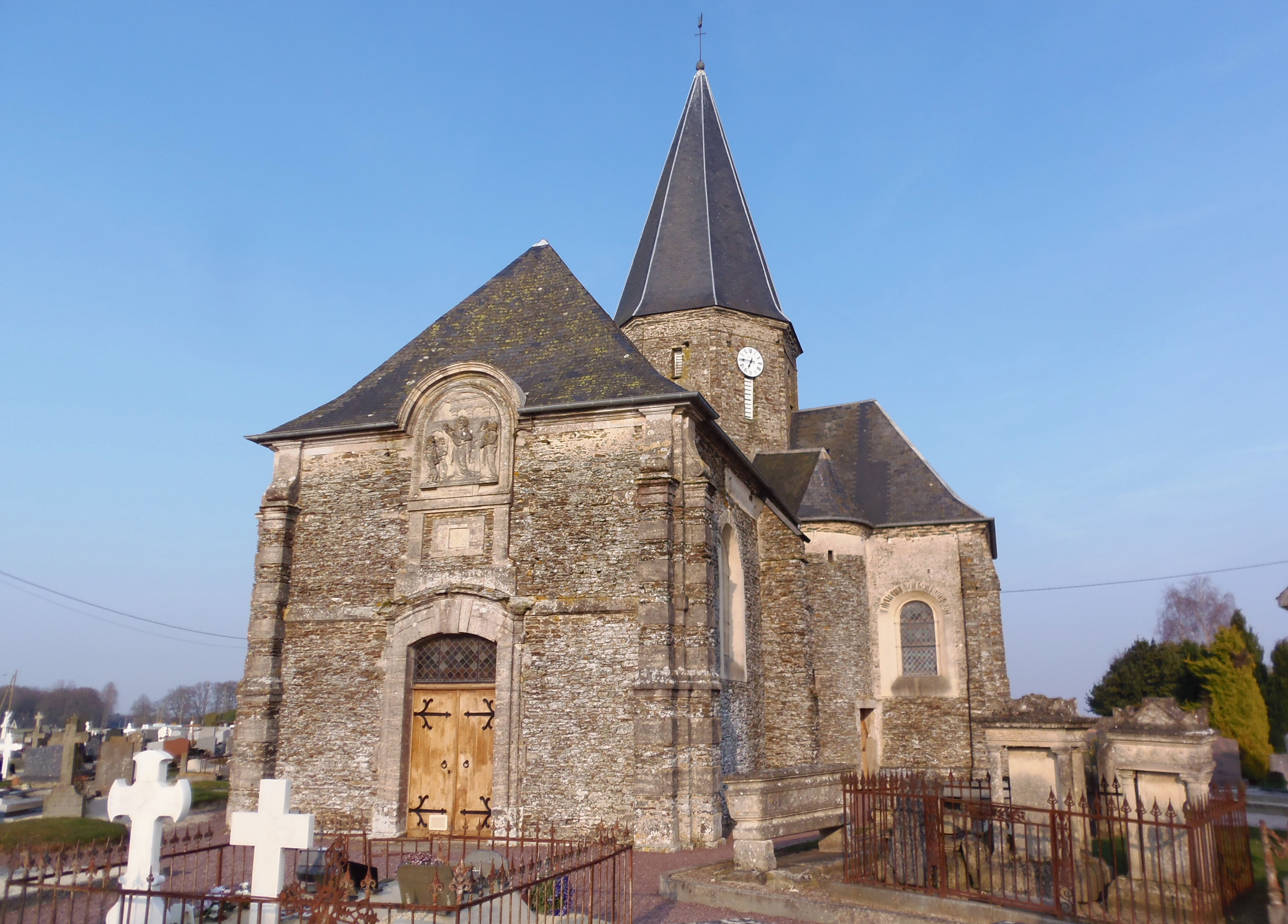 Saint-Paul-du-Vernay (Normandie, France). L'église Saint-Paul.